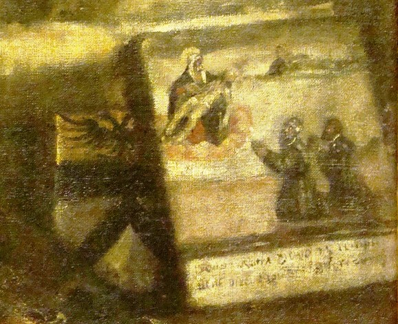 Particolare della Pietà di Tiziano: tavoletta votiva con Tiziano e il figlio Orazio in preghiera davanti alla Madonna. Dietro, stemma del casato Vecellio.